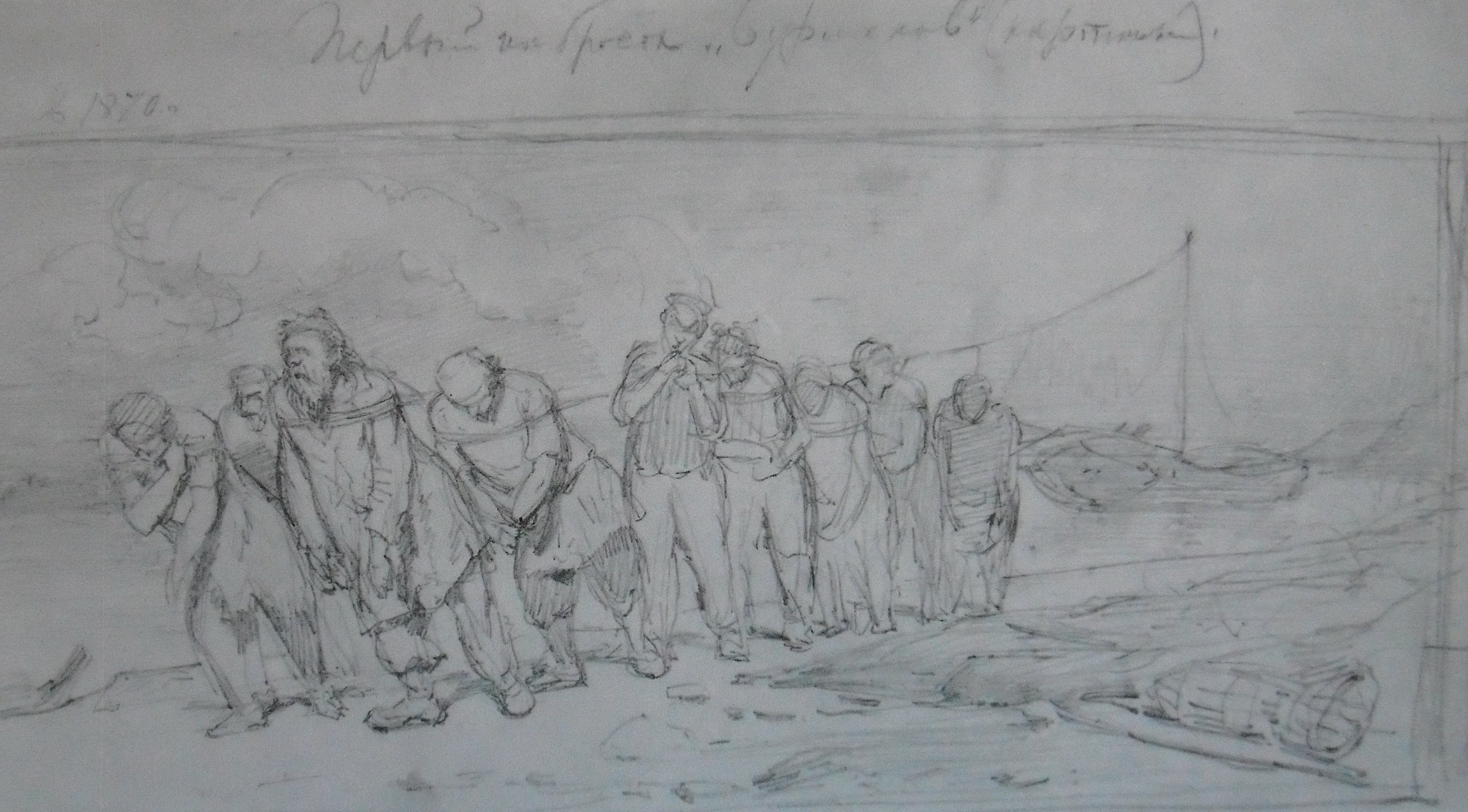 Эскиз картины "Бурлаки"